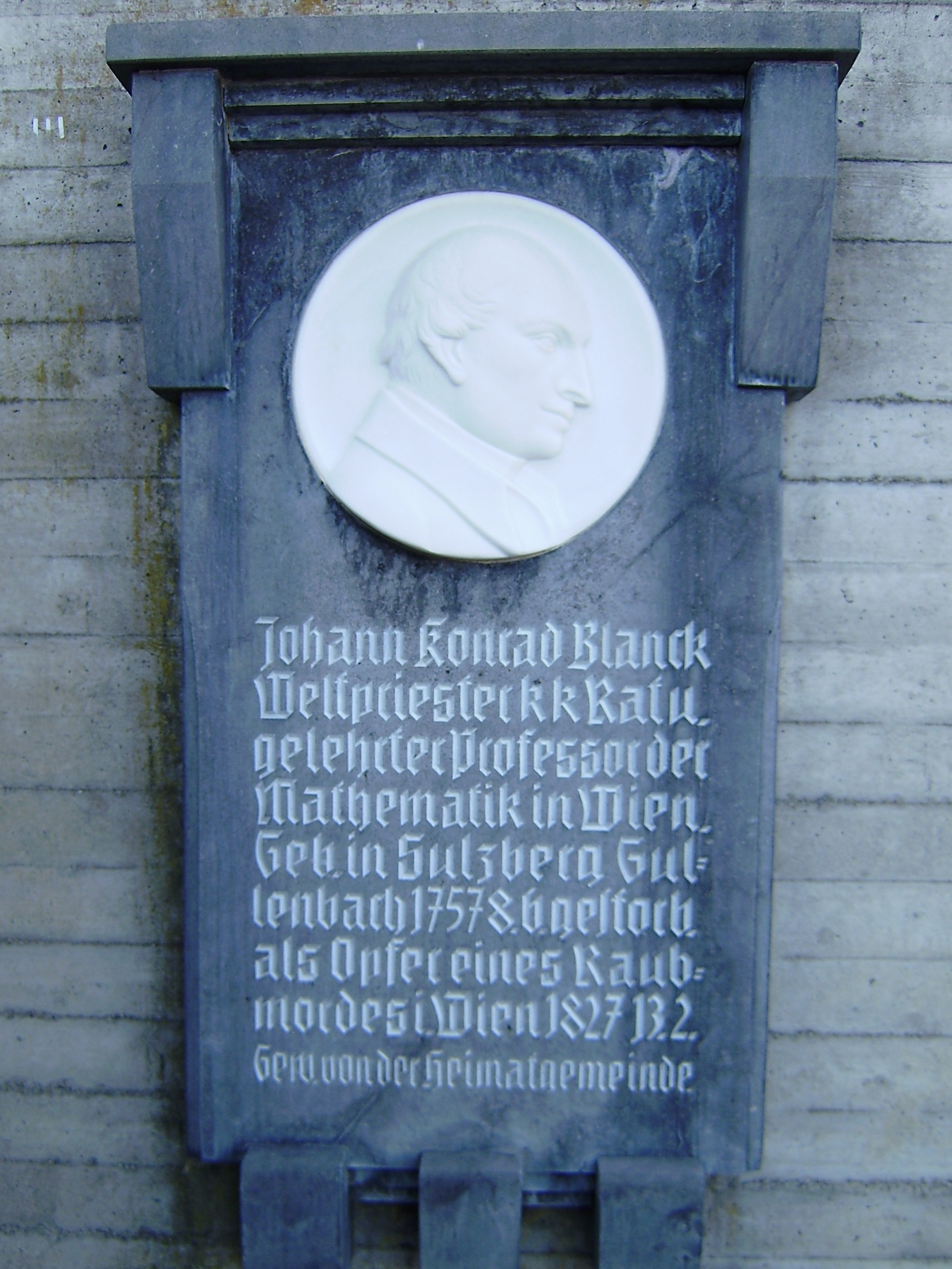 Grabstein Johann Conrad Blanks in Sulzberg Vbg mit der Inschrift: Johann Konrad Blanck ° Weltpriester k k Rat u. ° gelehrter Professor der ° Mathematik in Wien. ° Geb. in Sulzberg Gul= ° lenbach 1757 8.6. gestorb. ° als Opfer eines Raub= ° mordes i. Wien 1827 13.2.